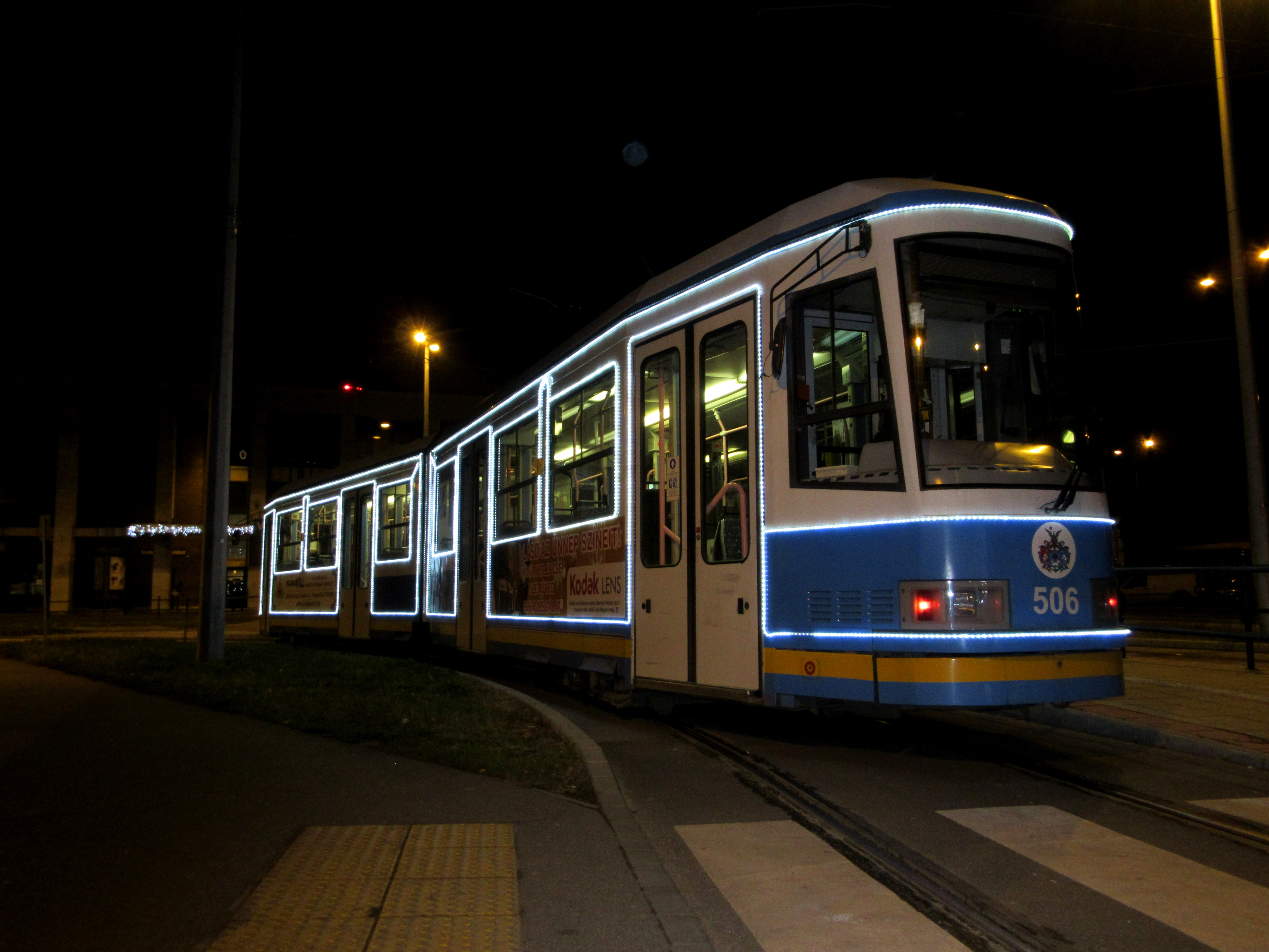 Lichtstraßenbahn in Debrecen, in Ungarn